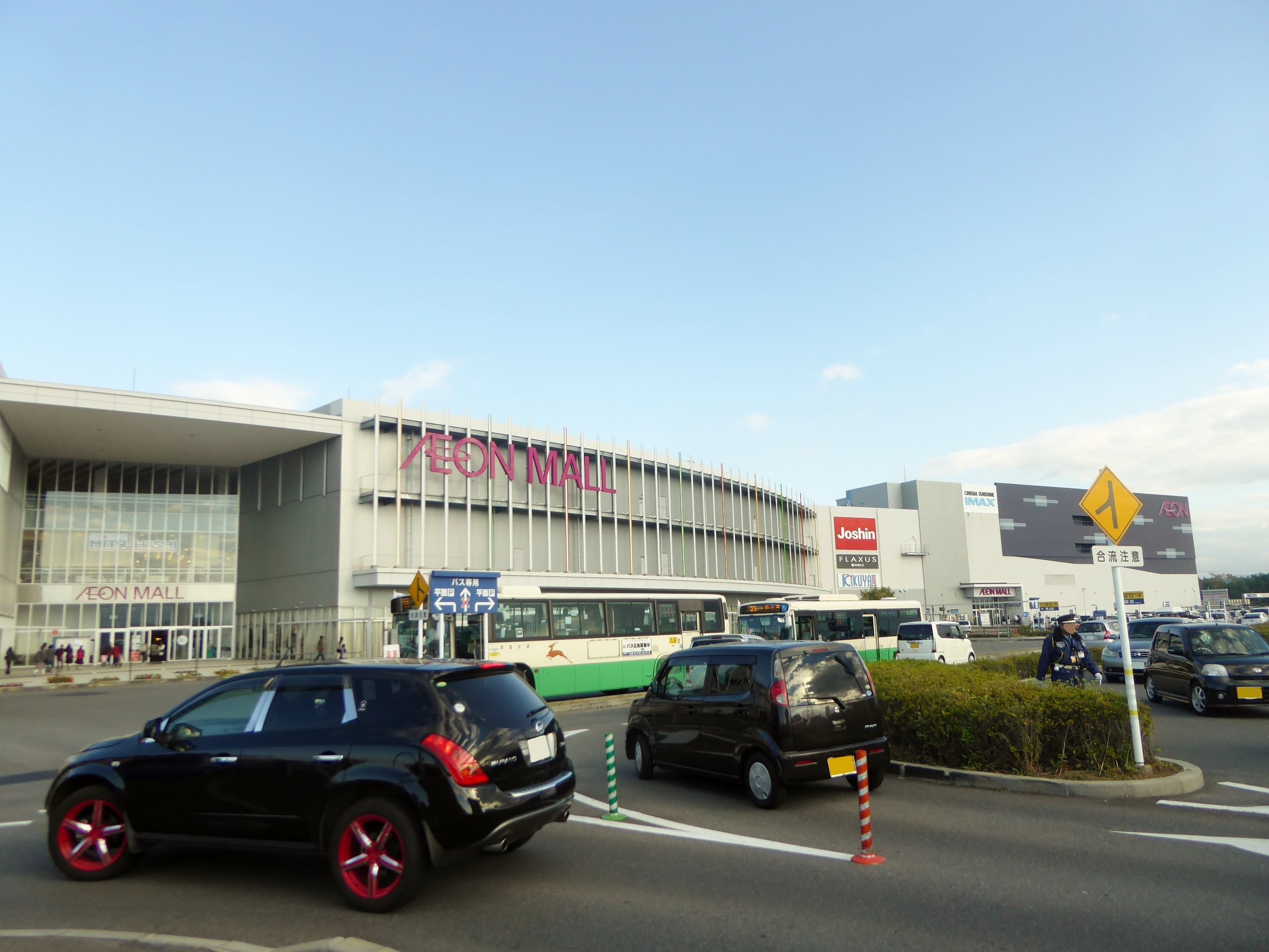 イオンモール大和郡山を撮影。